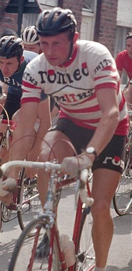 Camiel Vyncke in een Belgische wielerkoers (1967)